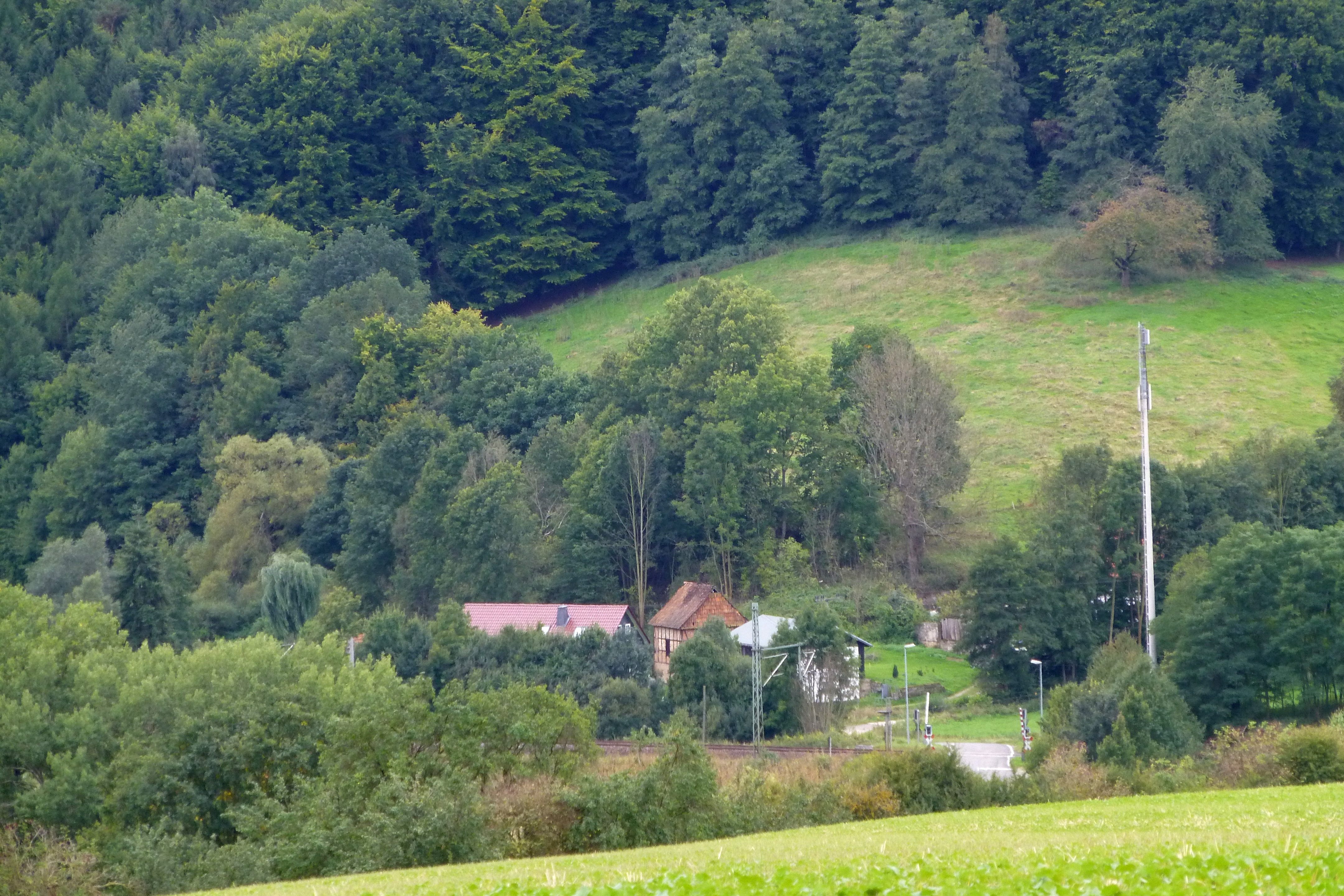 Blick von Norden vom Hang des Rustebergs ins Leinetal auf die Siedlung Eckstieg, Gemeinde Marth, Landkreis Eichsfeld